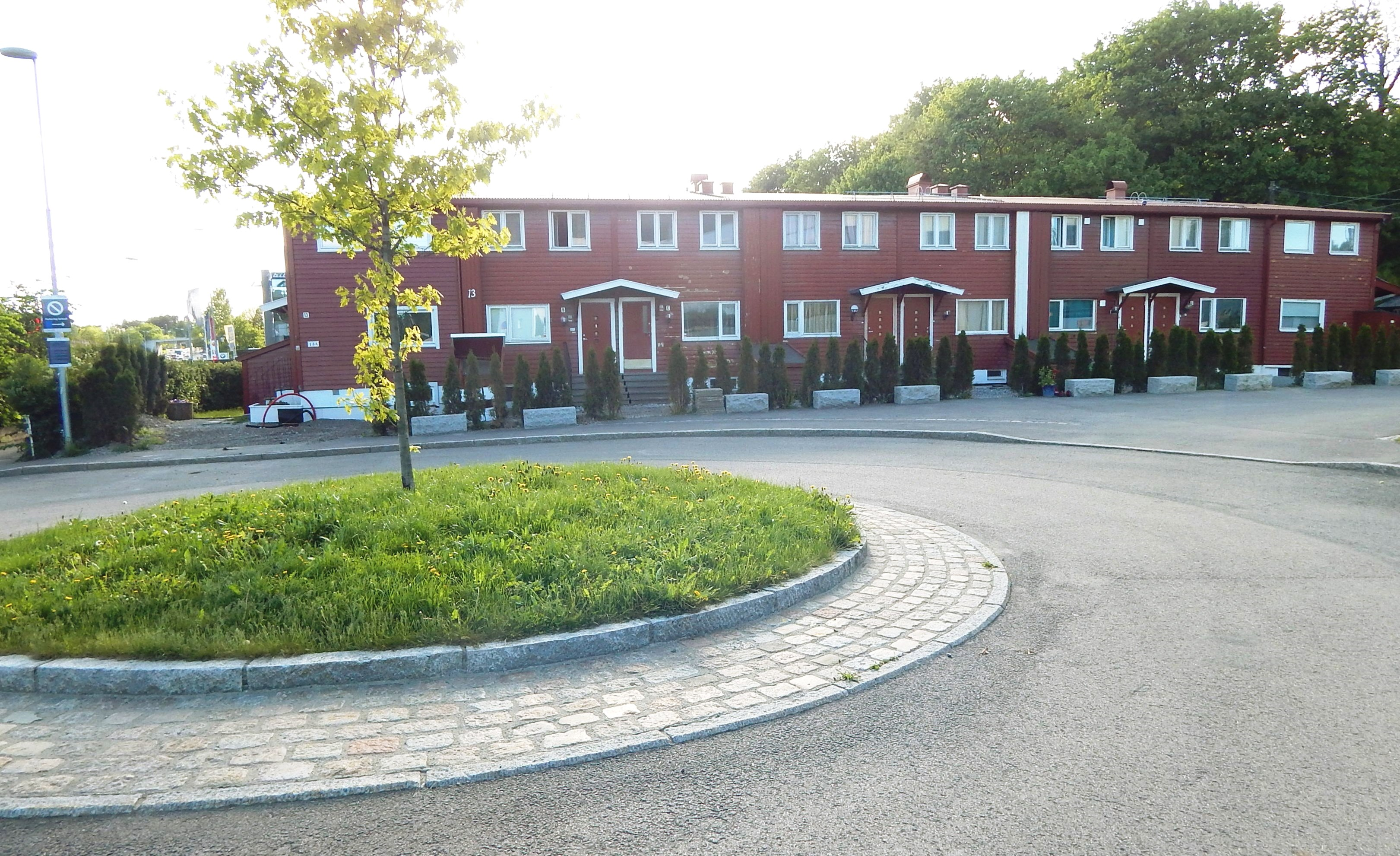 Bestumstubben 13